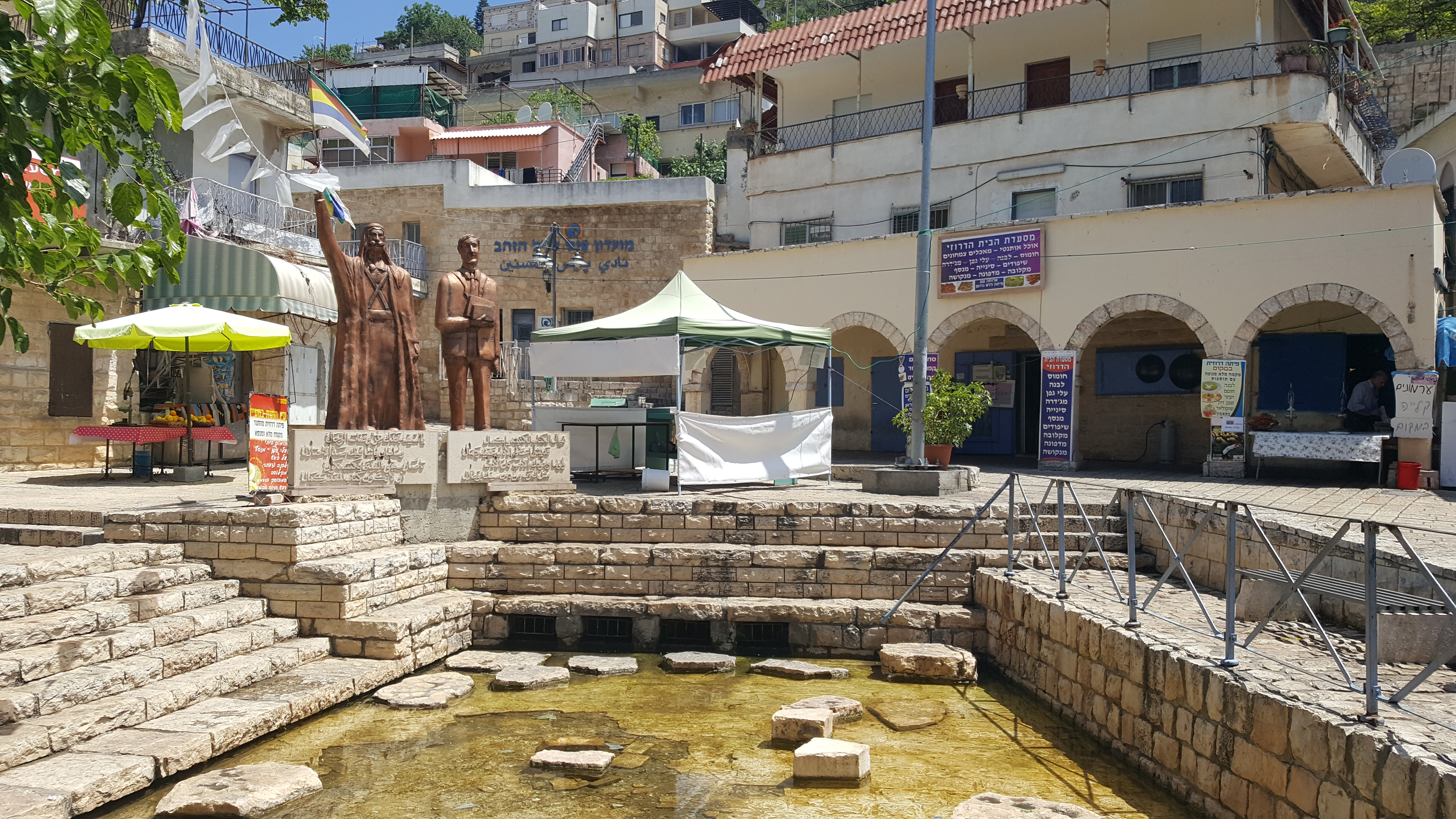 מרכז מבקרים המנוהל על ידי עמותה, ששימורו החל לפני כעשור שנים. המרכז ממוקם במבנה הקרוי "בית רחל ינאית" על שמה של רעיית נשיא מדינת ישראל לשעבר, רחל ינאית בן-צבי. תפקידו של המרכז להנציח ולשמר את מורשת יהודי פקיעין ואת מורשת משפחת זינאתי עתיקת-היומין. מרגלית זינאתי, הנצר האחרון למשפחה, מתגוררת במבנה ושומרת על בית הכנסת העתיק בפקיעין הממוקם בסמוך.